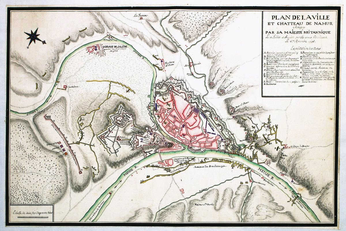 Original: Plan de la ville et Chatteau de Namur assiegez et prise par sa Maiesté Britanique le 12 Juillet et Reduita par Ses armes Victorieuses Le 5. Septembre 1695 (dt.: Plan der Belagerung von Namur durch die britischen Truppen, 12. Juli bis 5. September 1695), (Festungsgrundriss von Namur, Maas, 1695; mit den Stellungen und Bewegungen der Truppen, kolorierte Handzeichnung)